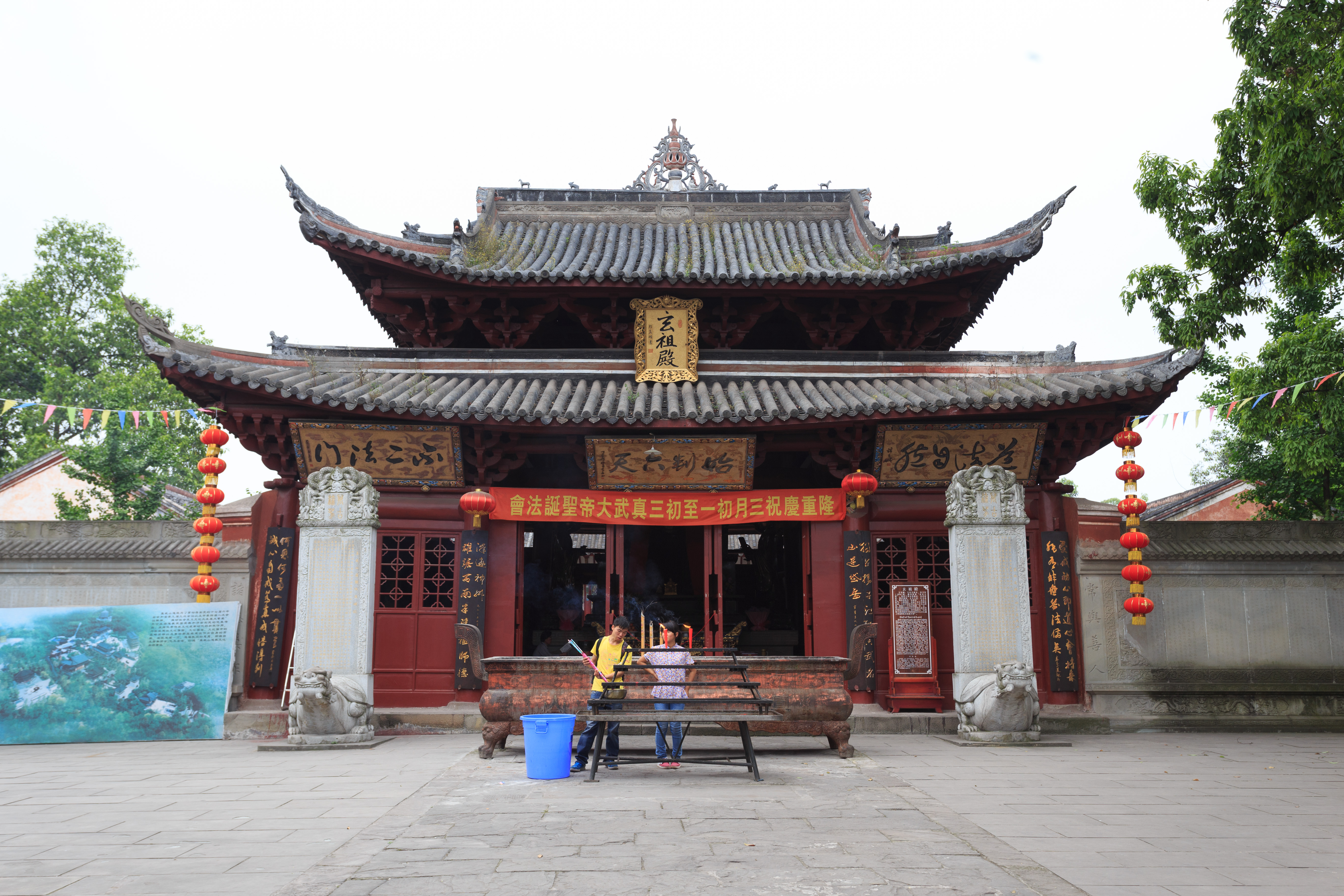 宜宾真武山古建筑群—— 玄祖殿